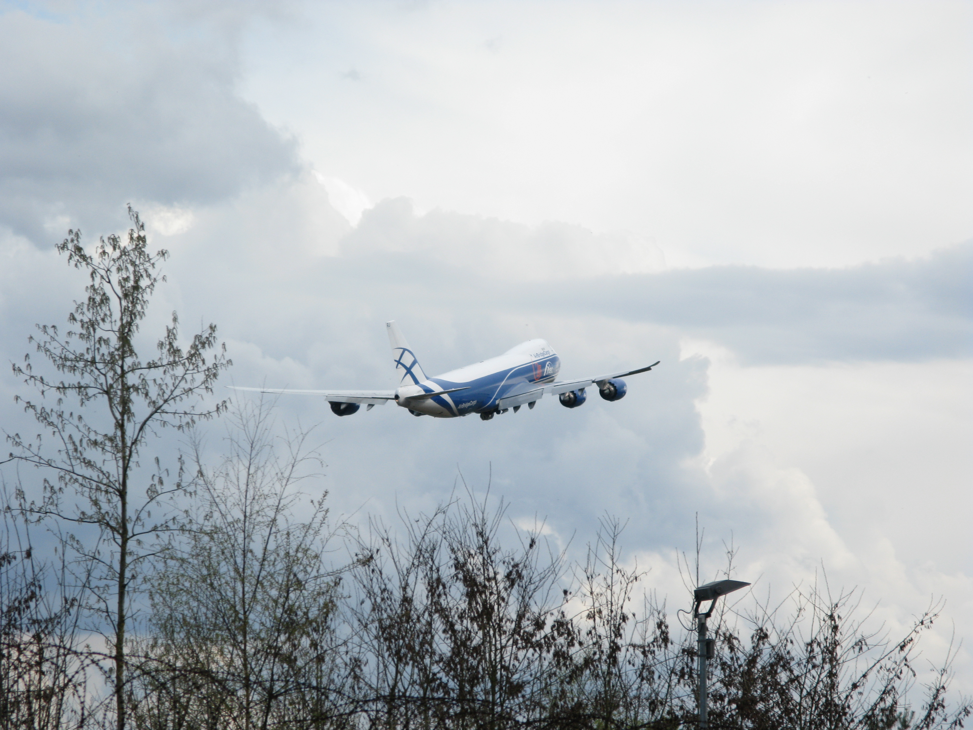 Von der im Norden gelegenen Startbahn West abfliegende Boeing 747-8F.